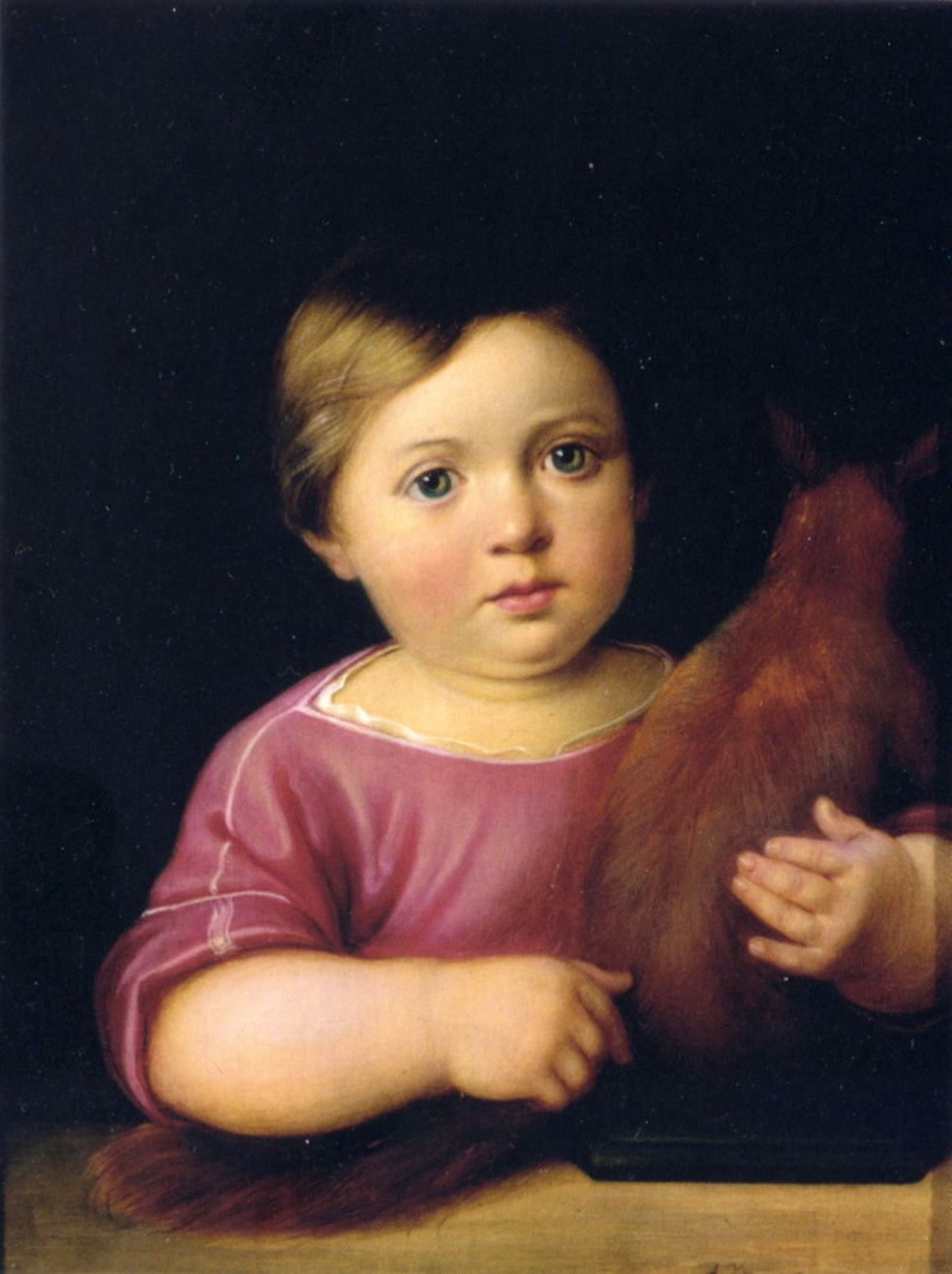 Die Tochter des Malers, Elisabeth Mathilde Zimmermann (*1844). Öl auf Holz. Gemälde im Kulturhistorischen Museum, Neißstraße 30 in Görlitz